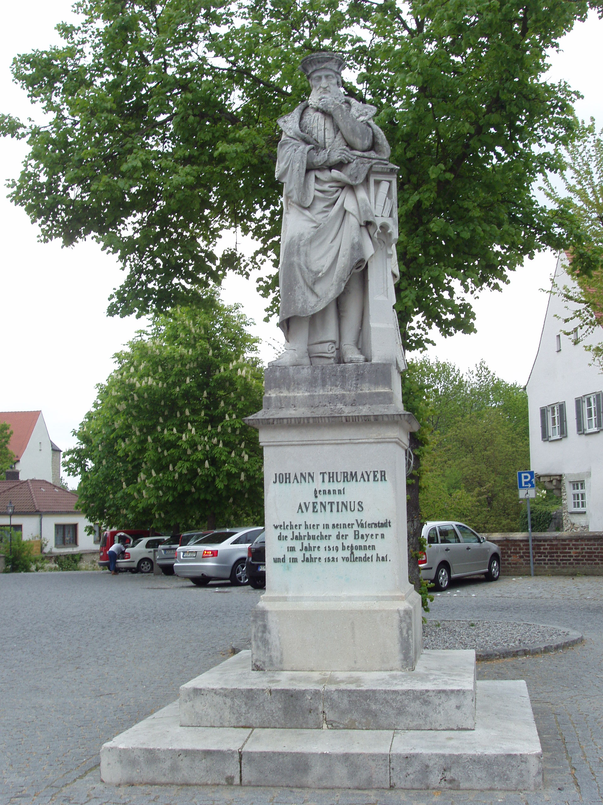 Das am 12.10.1861 enthüllte Aventinus-Denkmal in Abensberg